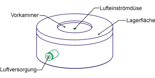 Eindüsen-Luftlager mit Vorkammer